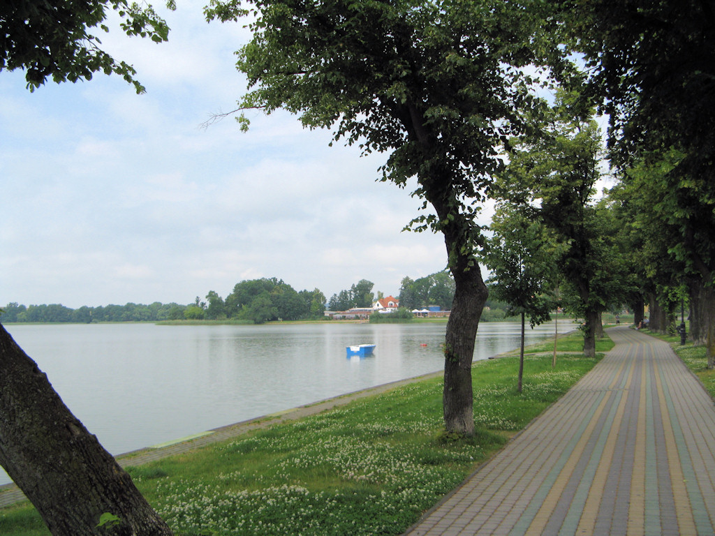 Promenada nad Jeziorem Ełckim w Ełku